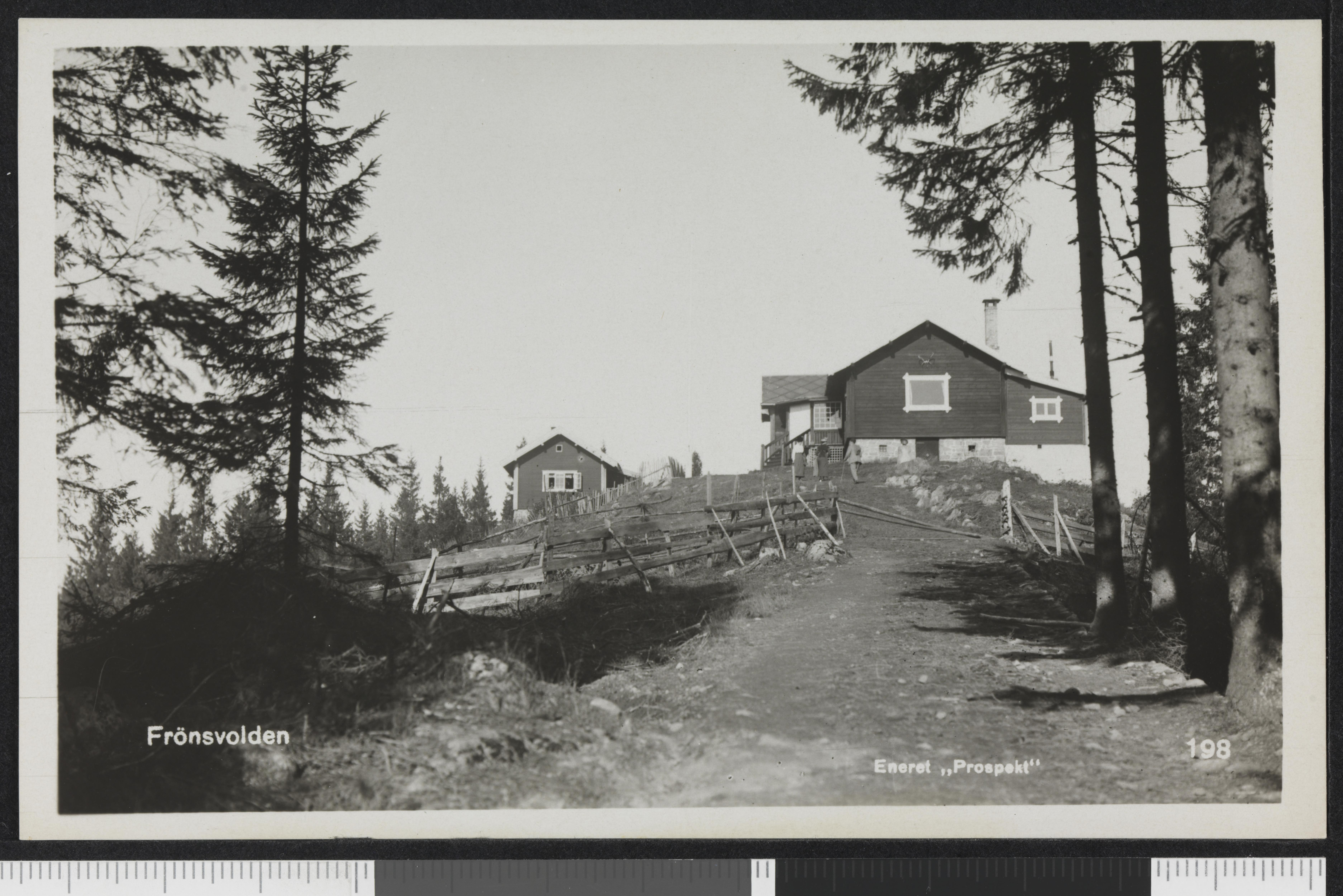 Bildet er hentet fra Nasjonalbibliotekets bildesamling Frønsvollen,Nordmarka, Oslo, Oslo